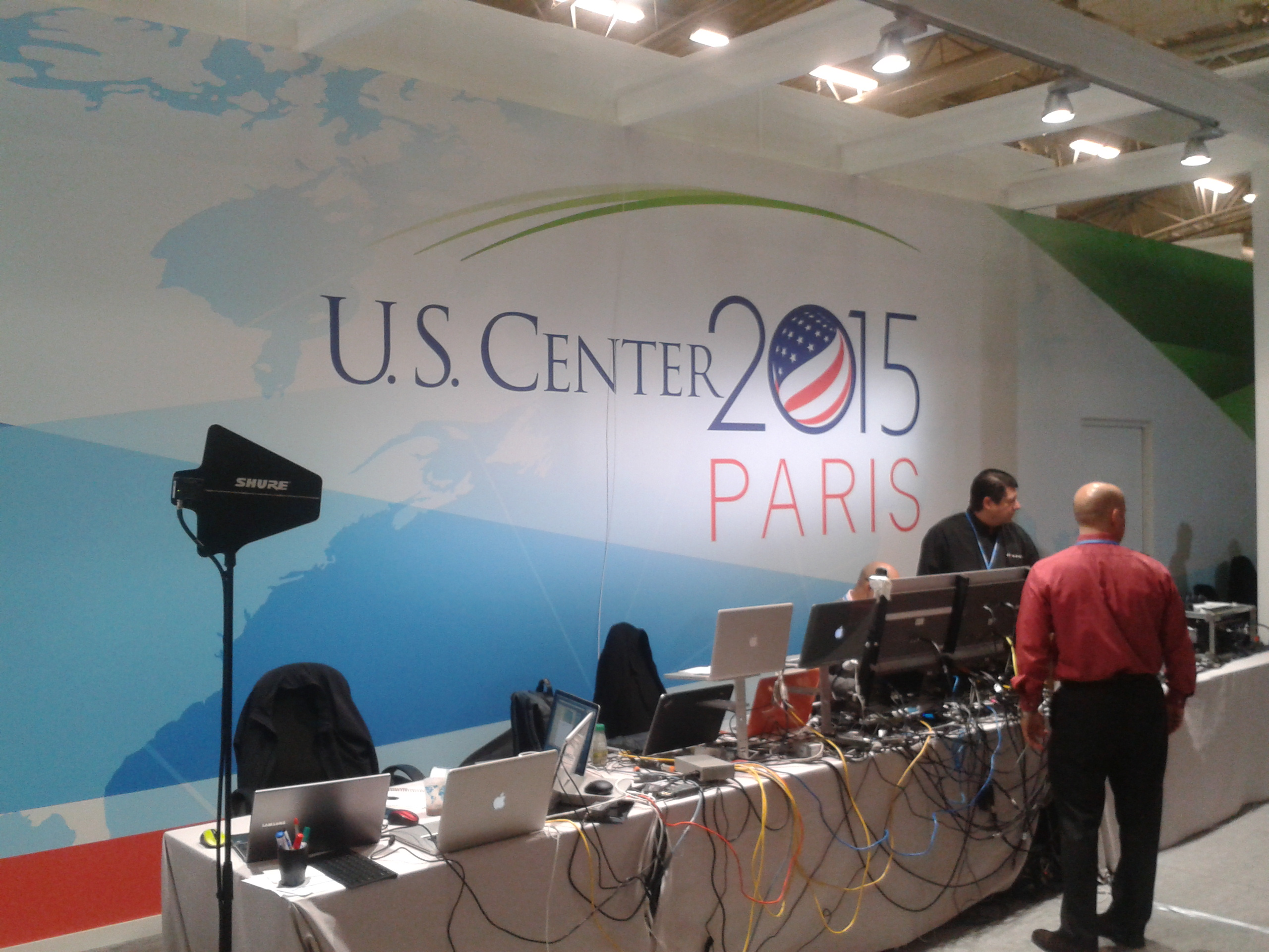 Pavillon des Etats-Unis à la COP 21